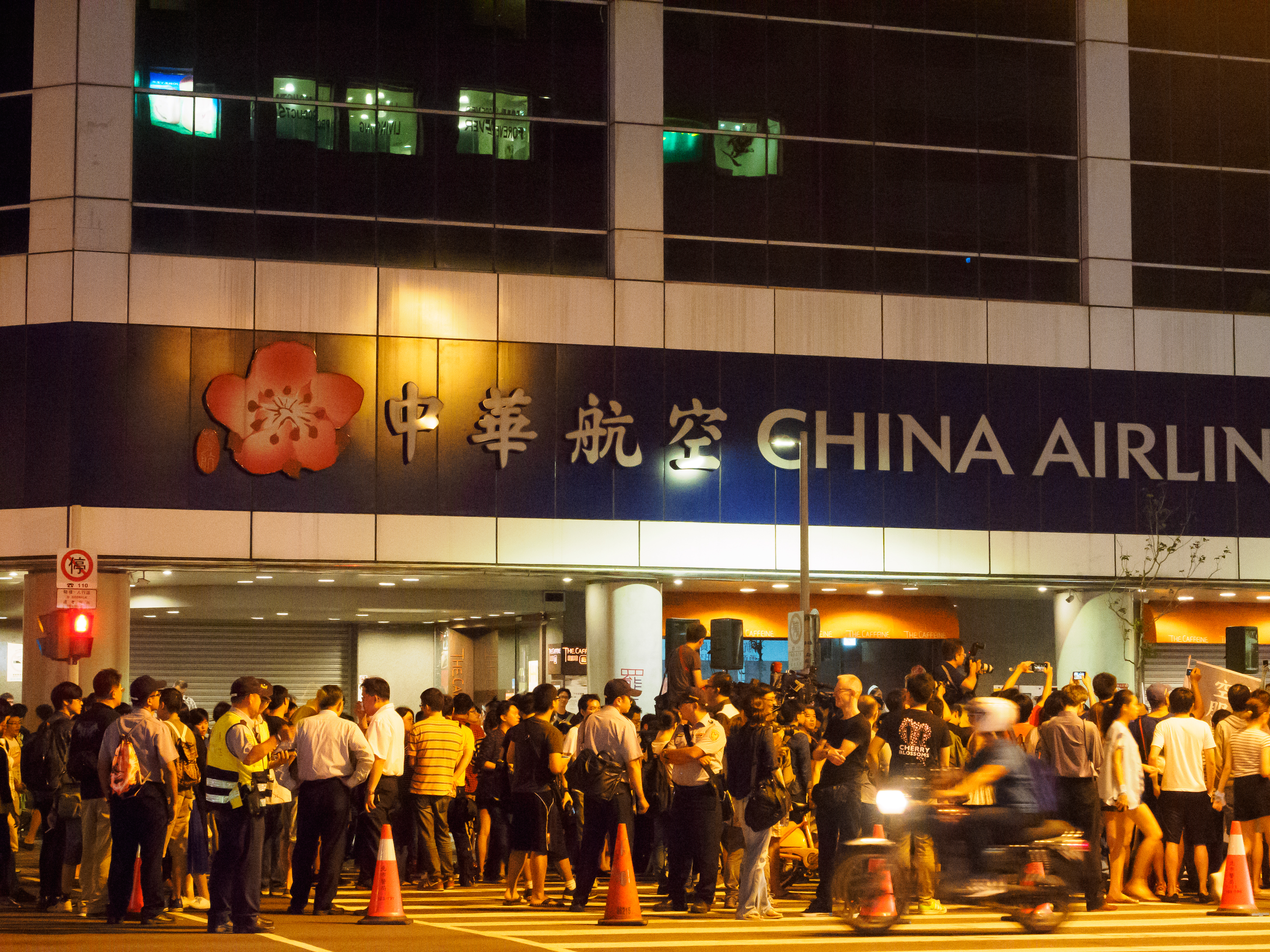 OLYMPUS DIGITAL CAMERA 2016 China Airlines strike